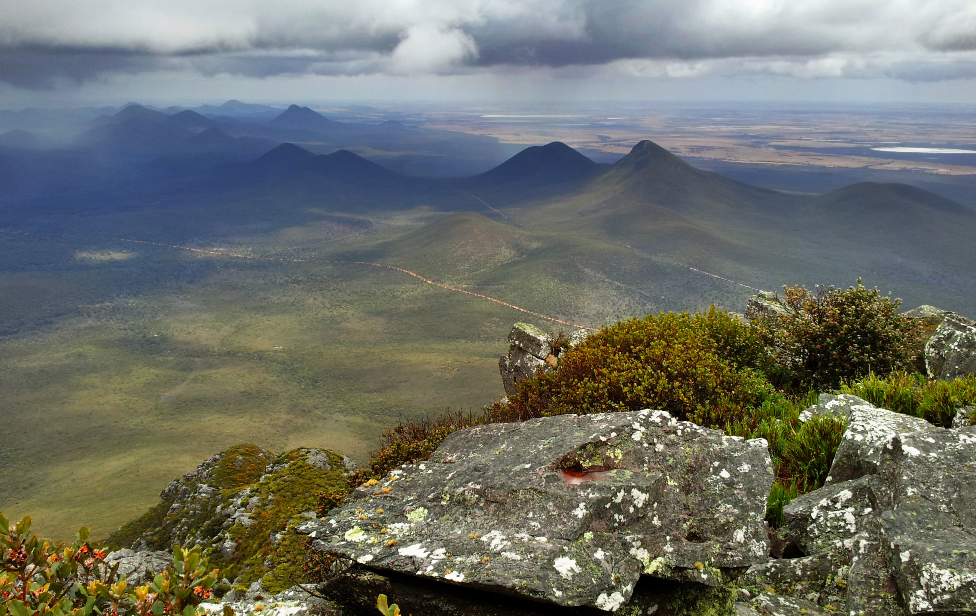 Mt Toolbrunup